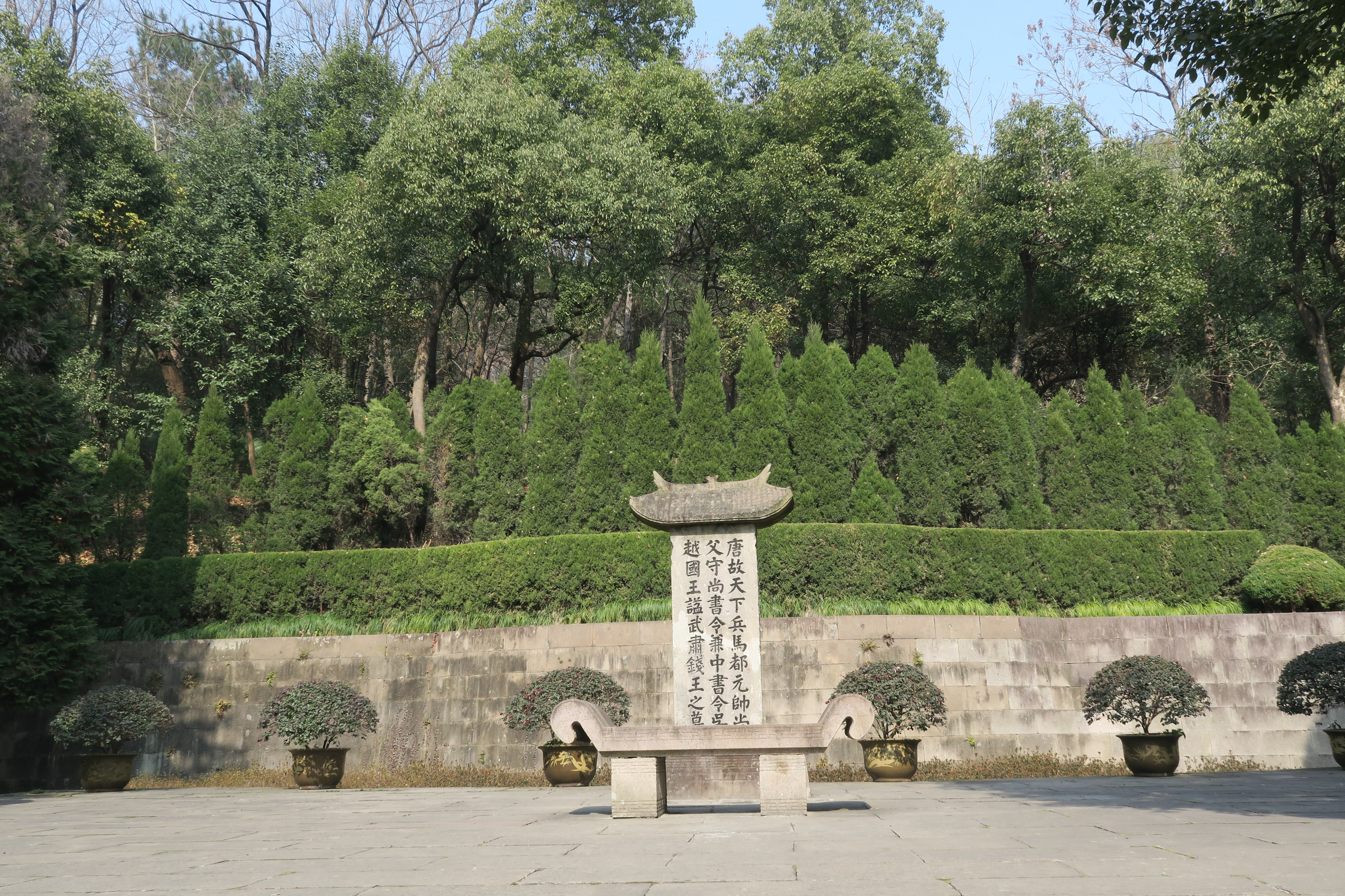 临安钱镠墓